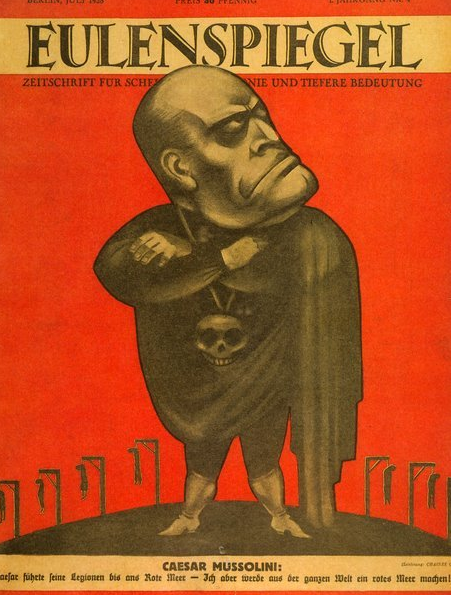 Charles Girod: Benito 'Caesar' Mussolini auf dem Titel des EULENSPIEGEL, Juli 1928